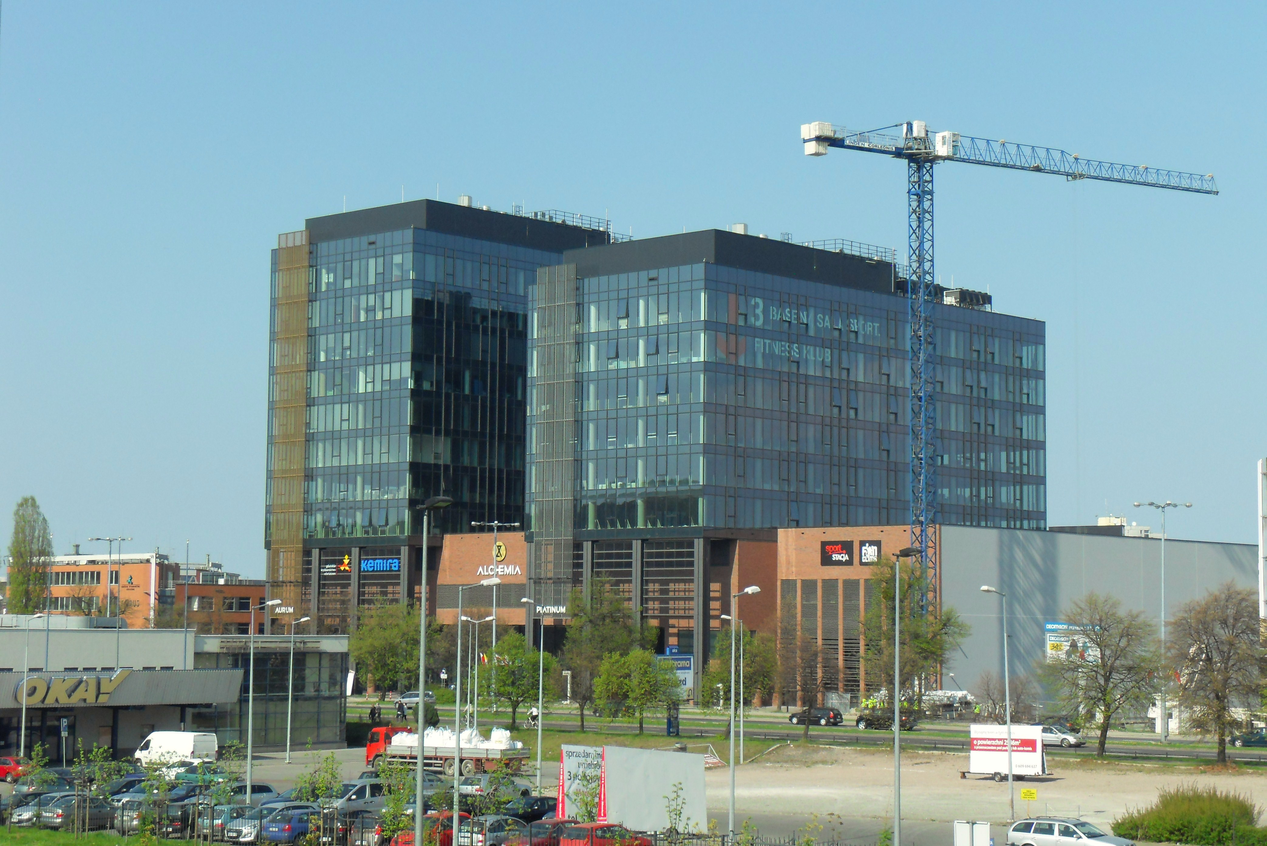 Gdańsk Oliwa, kompleks biurowo-usługowy "Alchemia", wieżowce "Aurum" i "Platinum".